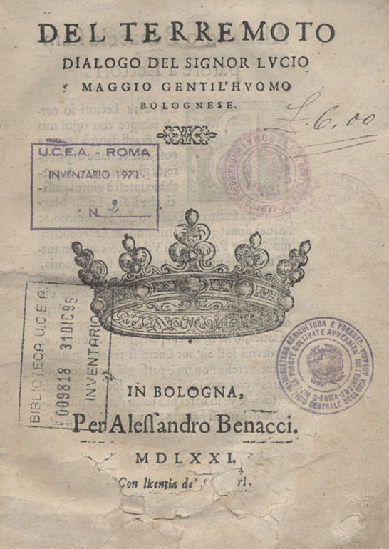 Frontespizio dell'opera Del terremoto, dialogo del signor Lucio Maggio gentil'huomo bolognese